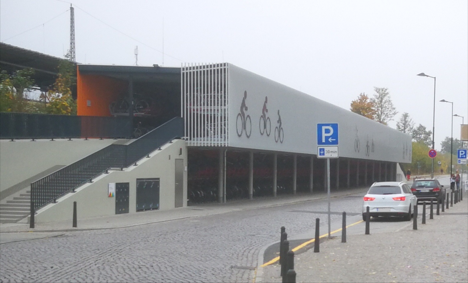 Neugebaute Fahrradabstellanlage, welche direkt am Bahnhof Oranienburg ist und einen direkten Zugang vom S-Bahnsteig hat.